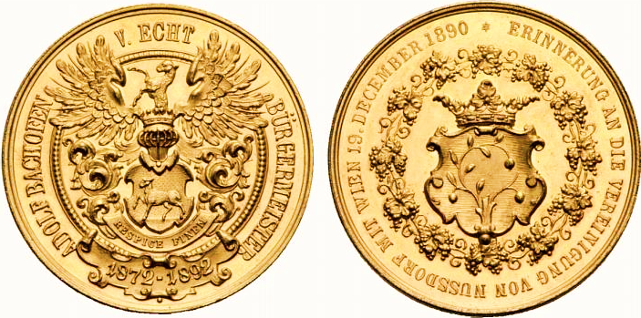 Wien-Nußdorf-Medaille 1892, von Heinrich Jauner (1833—1912), Medailleur und Hofgraveur. Auf das 20jährige Jubiläum Karl Adolf Bachofen von Echt als Bürgermeister von Nußdorf (1872—1892) und die Vereinigung Nußdorfs mit Wien (anno 1890). Revers: Wappen der Familie Bachofen; Avers: Nußdorfer Wappen.